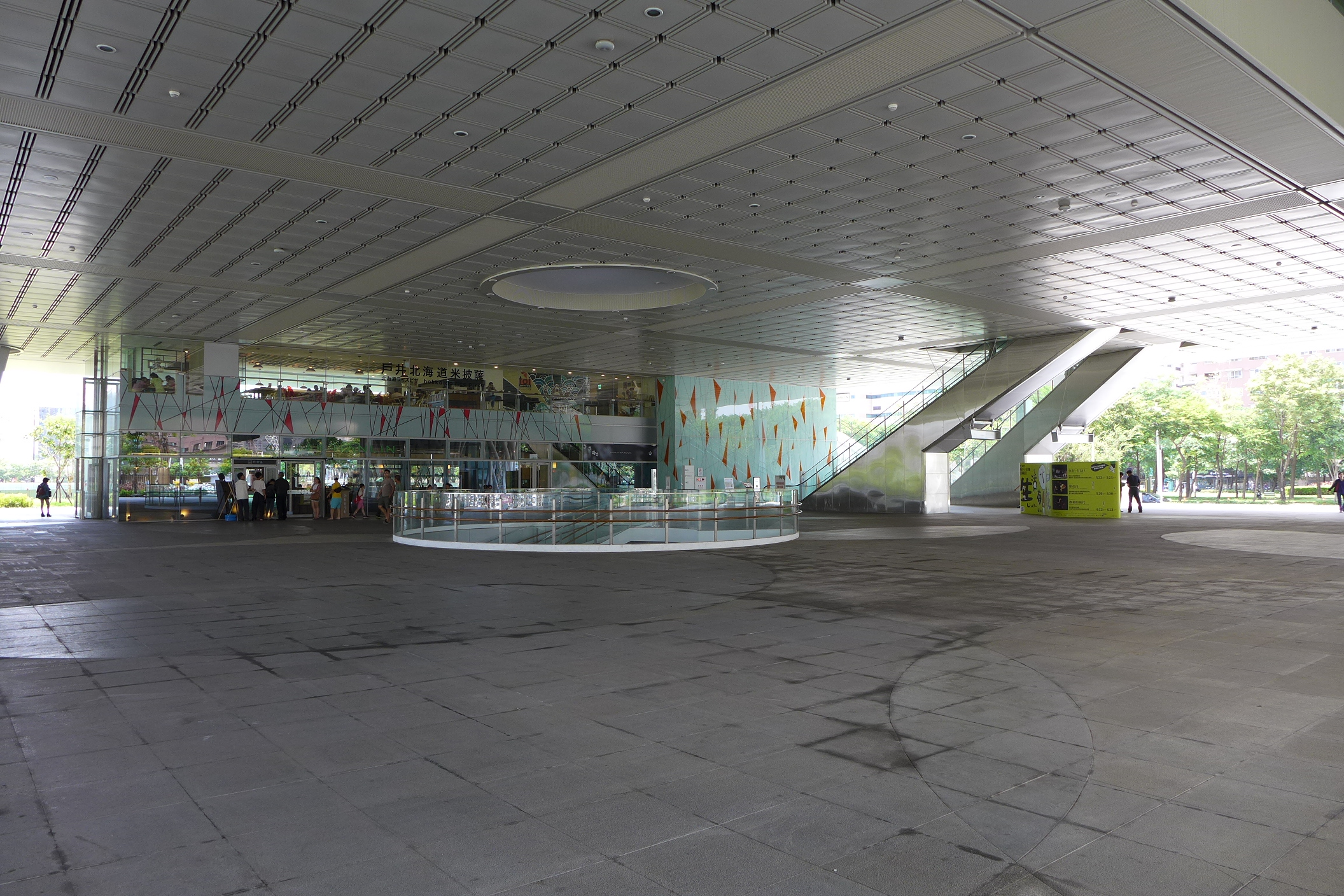 Kaohsiung Main Library GF Plaza